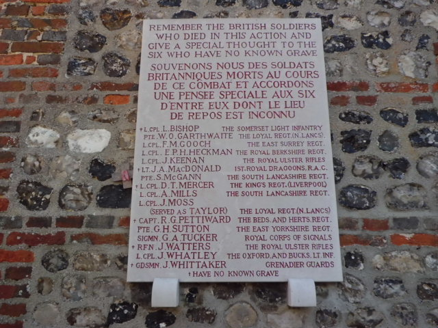 Dieppe_Raid_B_1942